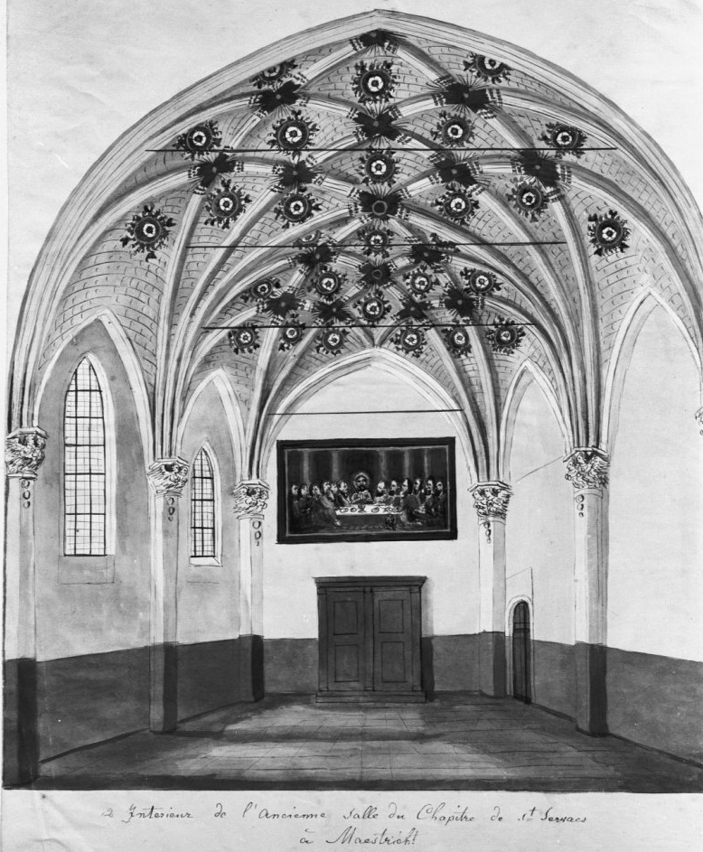 Sint-Servaaskerk: interieur vm. kapittelzaal, van 1873 tot 1982 schatkamer, thans Sint-Servaaskapel (dagkapel). Reproductie van tekening van Philippe van Gulpen in collectie RHCL, Maastricht.